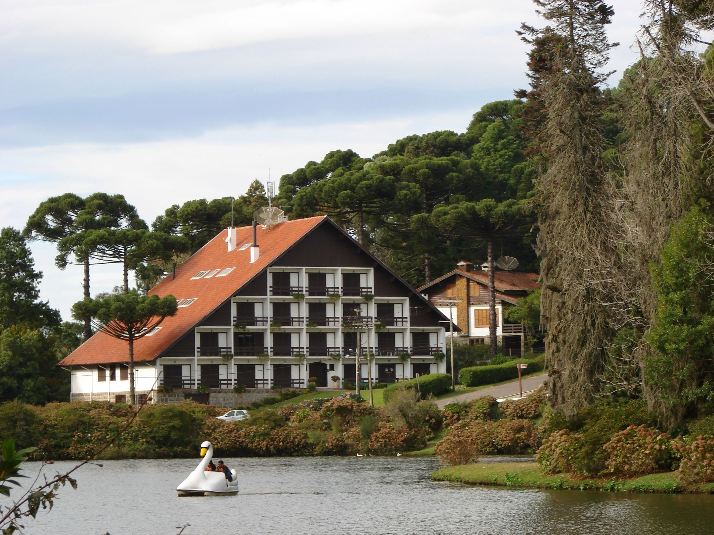 Lago Negro - Gramado - Brasil